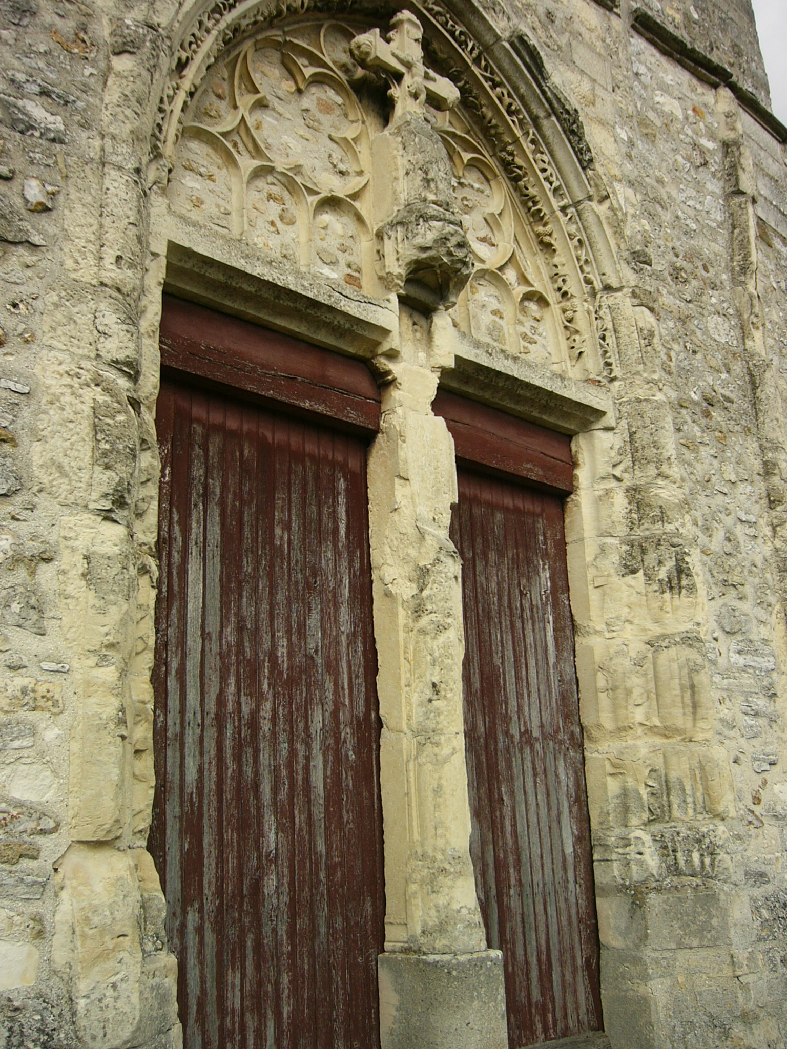 auteur : koakoo Date : le 6 mai 2006